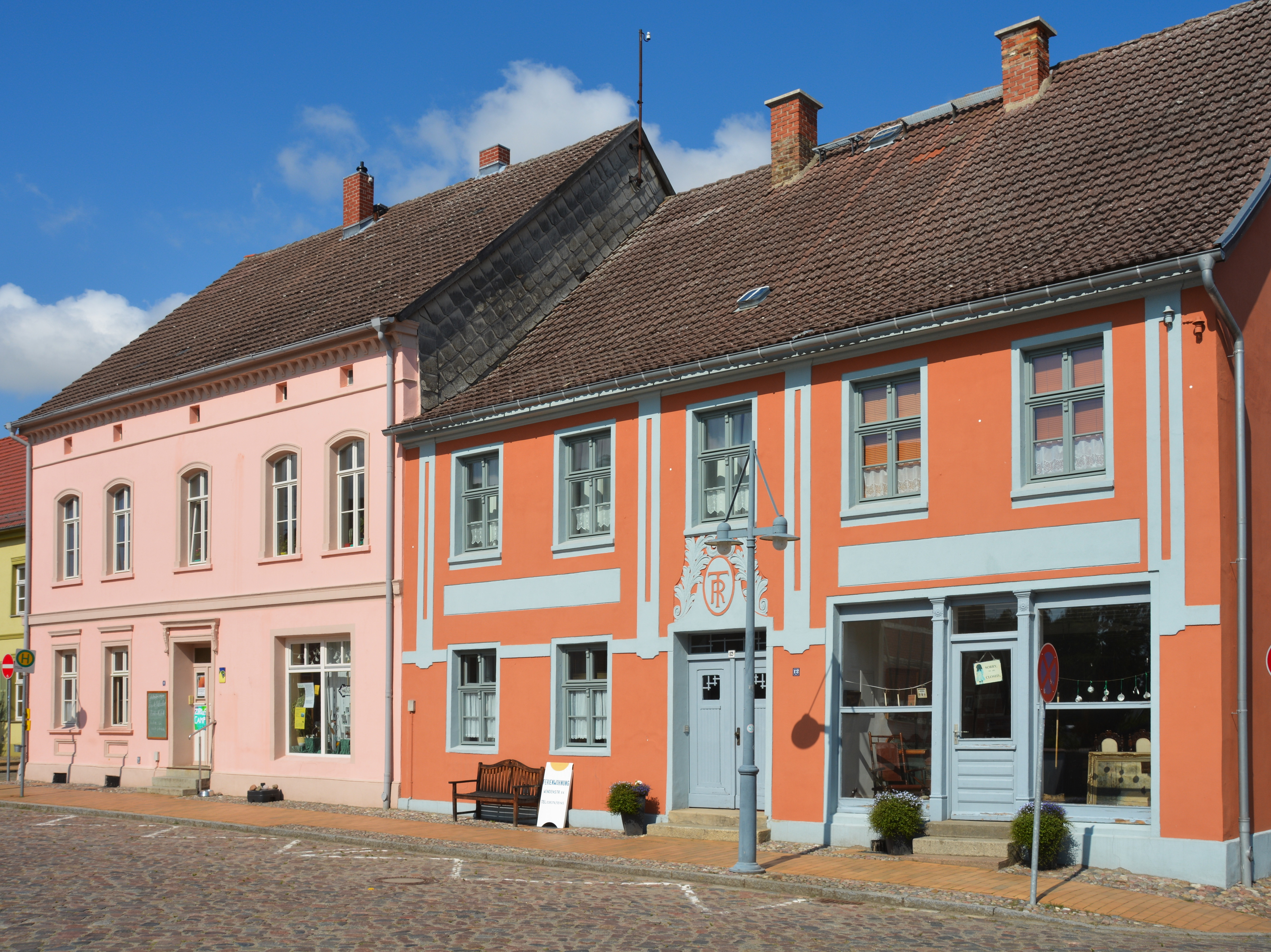 Lassan (17389 Wolgast), Häuser Markt 11/12